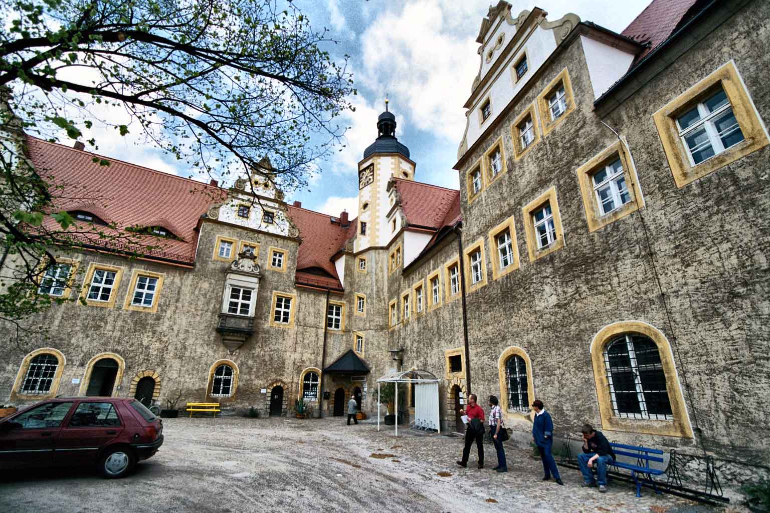 Altes Jagdschloss Wermsdorf mit Linde in Sachsen